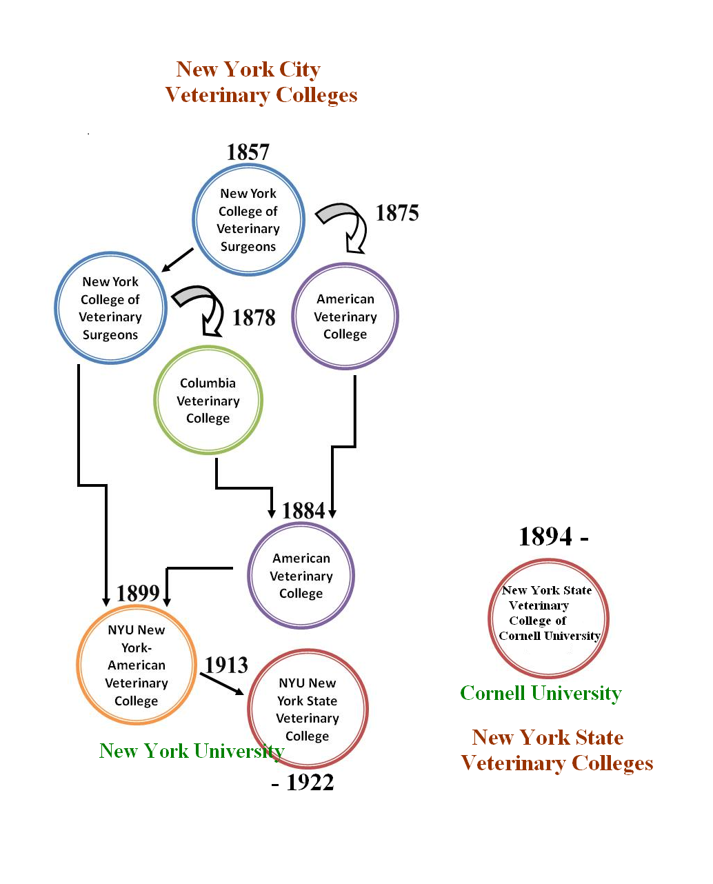 Veterinary Colleges de New York City et de l'État de New York. Seul demeure le Veterinary College de Cornell University